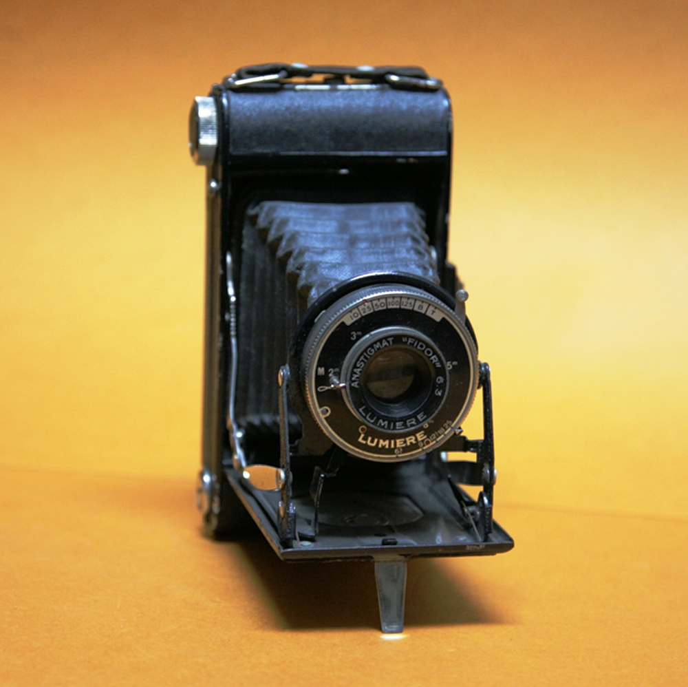 Coll. Marcè CL - Lumiere & Cie Modello Lumirex con obiettivo anastigmat con pellicola 120 6x9 cm prodotta in Francia nel 1936